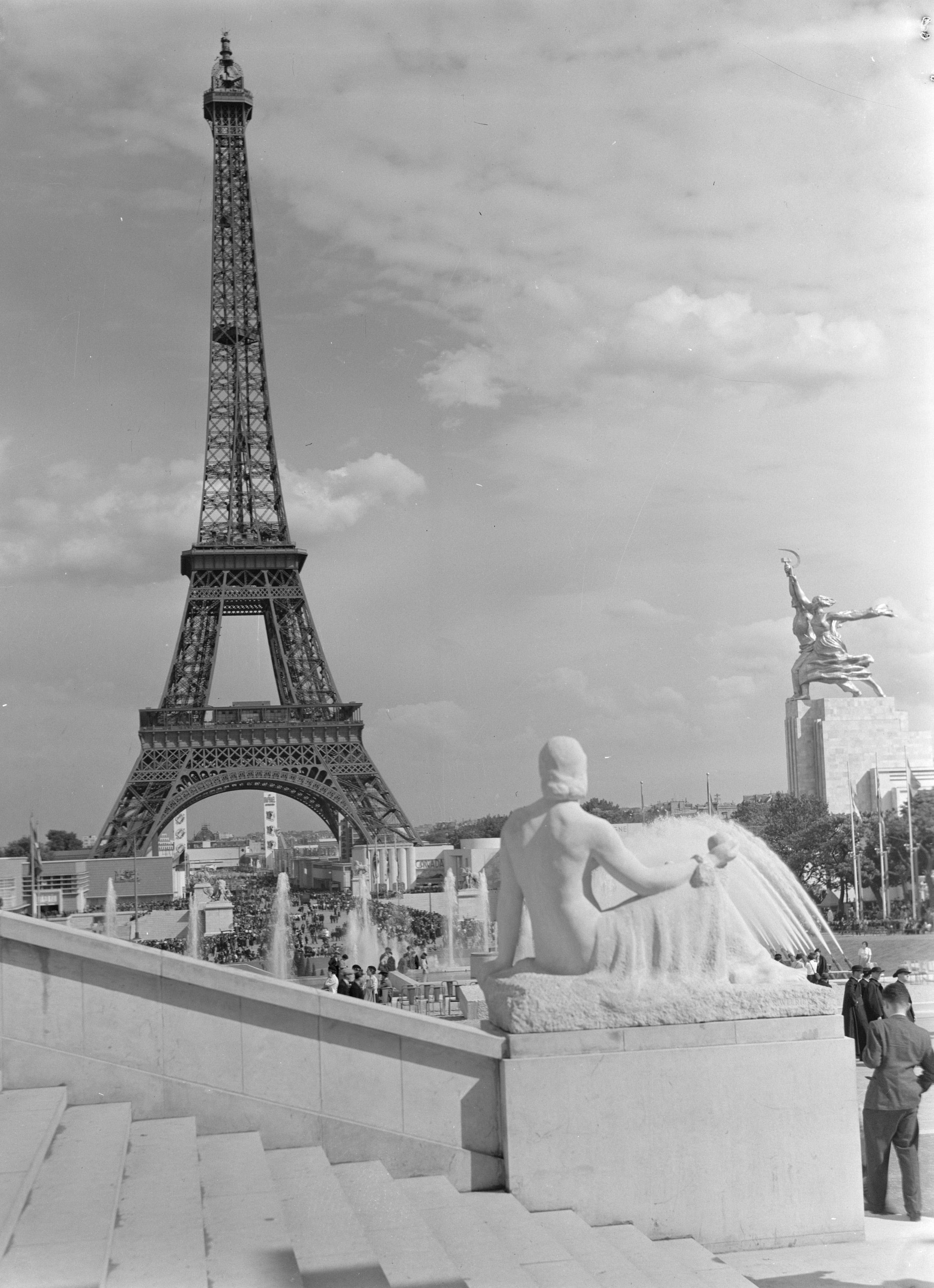 Collectie / Archief : Fotocollectie Van de Poll Reportage / Serie : Wereldtentoonstelling Parijs 1937 Beschrijving : De Eiffeltoren en het paviljoen van de Sovjet-Unie gezien vanaf de trappen van het Palais de Chaillot Datum : 1937 Locatie : Frankrijk, Parijs Trefwoorden : architectuur, beeldhouwwerken, musea, torens, trappen, wereldtentoonstellingen Fotograaf : Poll, Willem van de, [onbekend] Auteursrechthebbende : Nationaal Archief Materiaalsoort : Negatief (6x6) Nummer archiefinventaris : bekijk toegang 2.24.14.02 Bestanddeelnummer : 254-2687